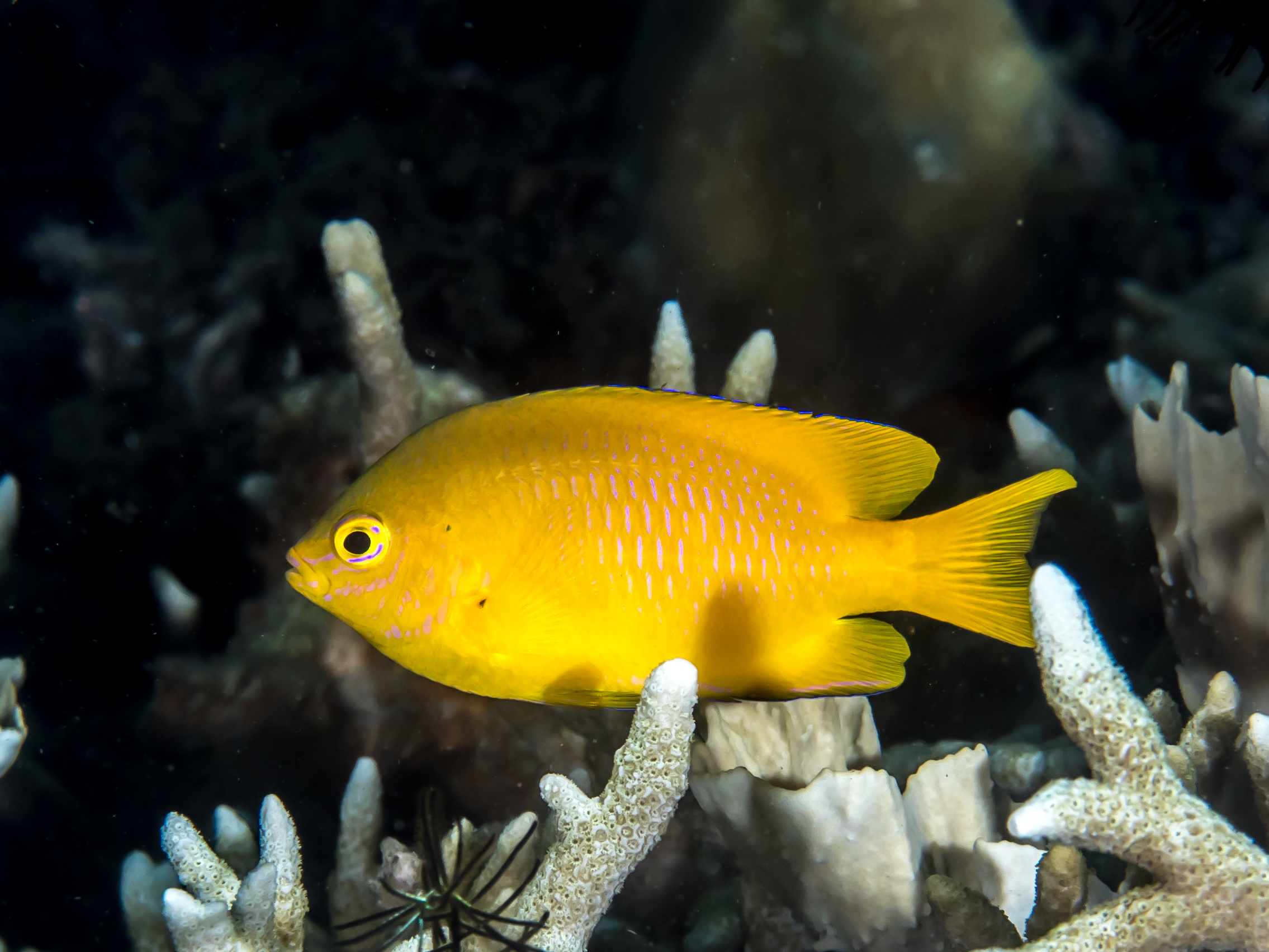 Lembeh, Indonesia - Lemon damsel (Pomacentrus moluccensis)